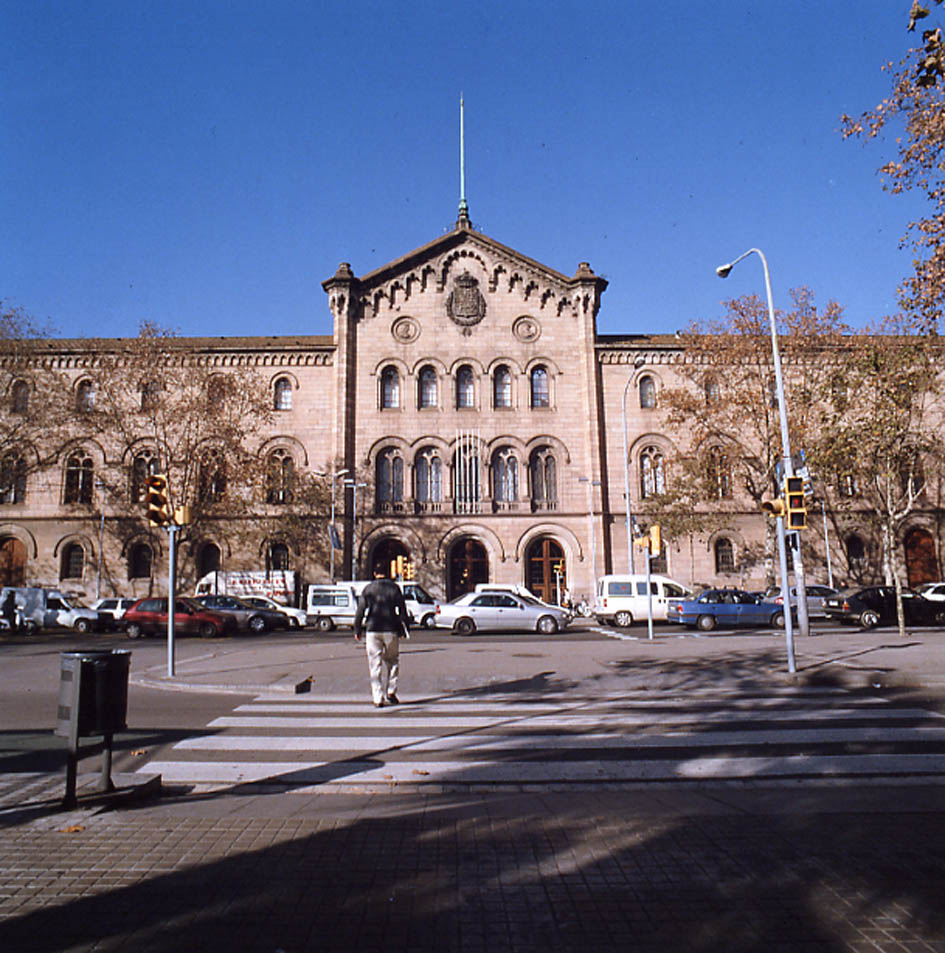 Façana de l'edifici històric de la Universitat de Barcelona